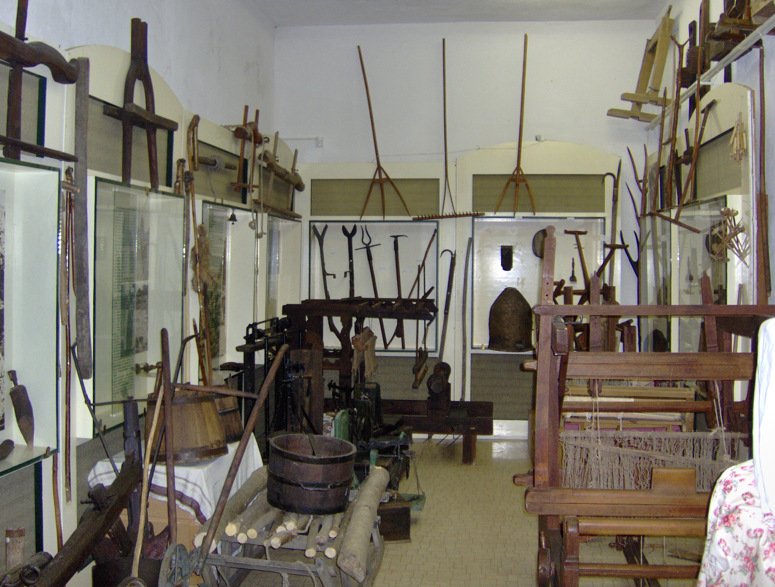 Az ipolysági Honti Múzeum néprajzi részlege